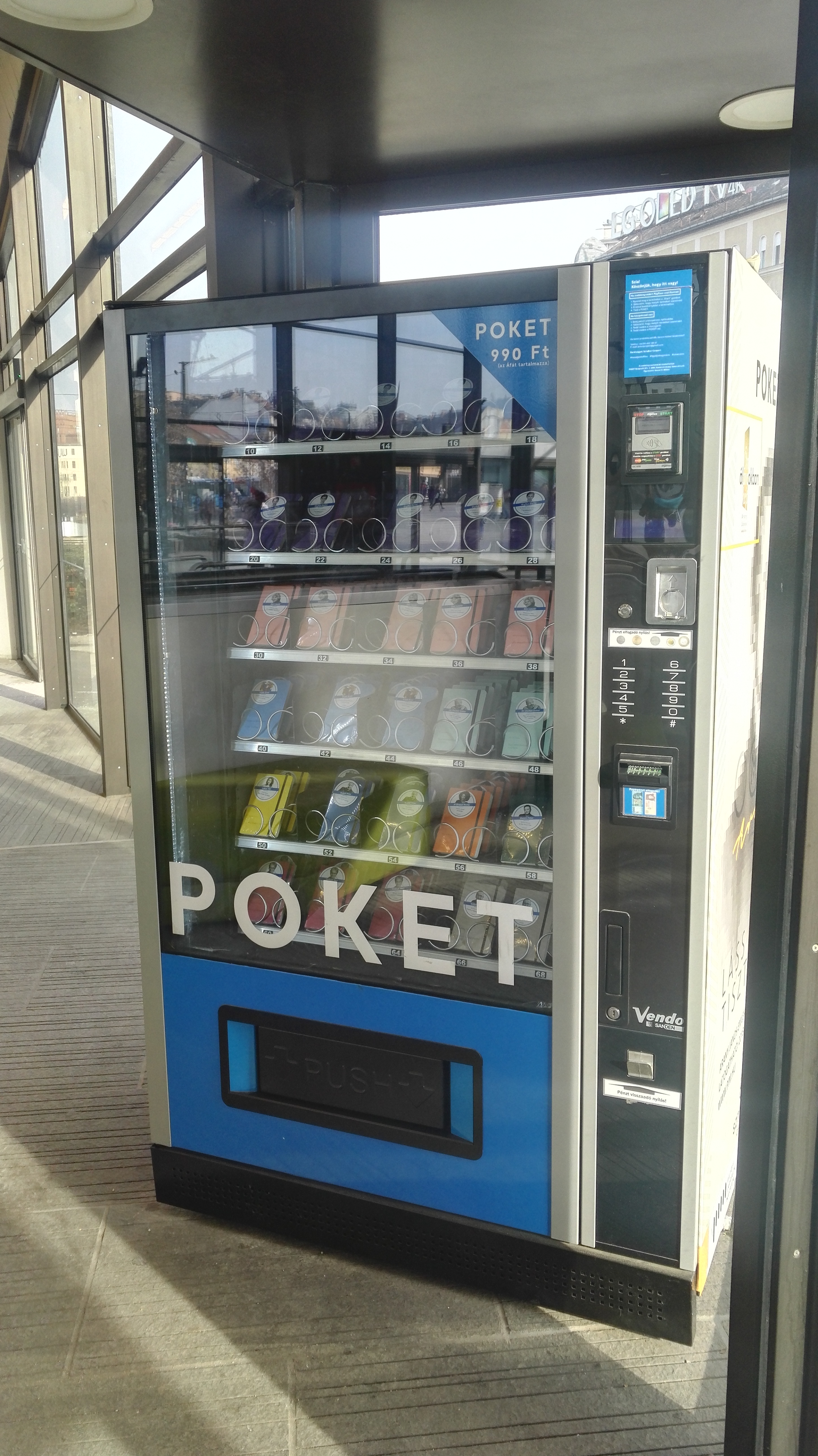 Poket könyvautomata